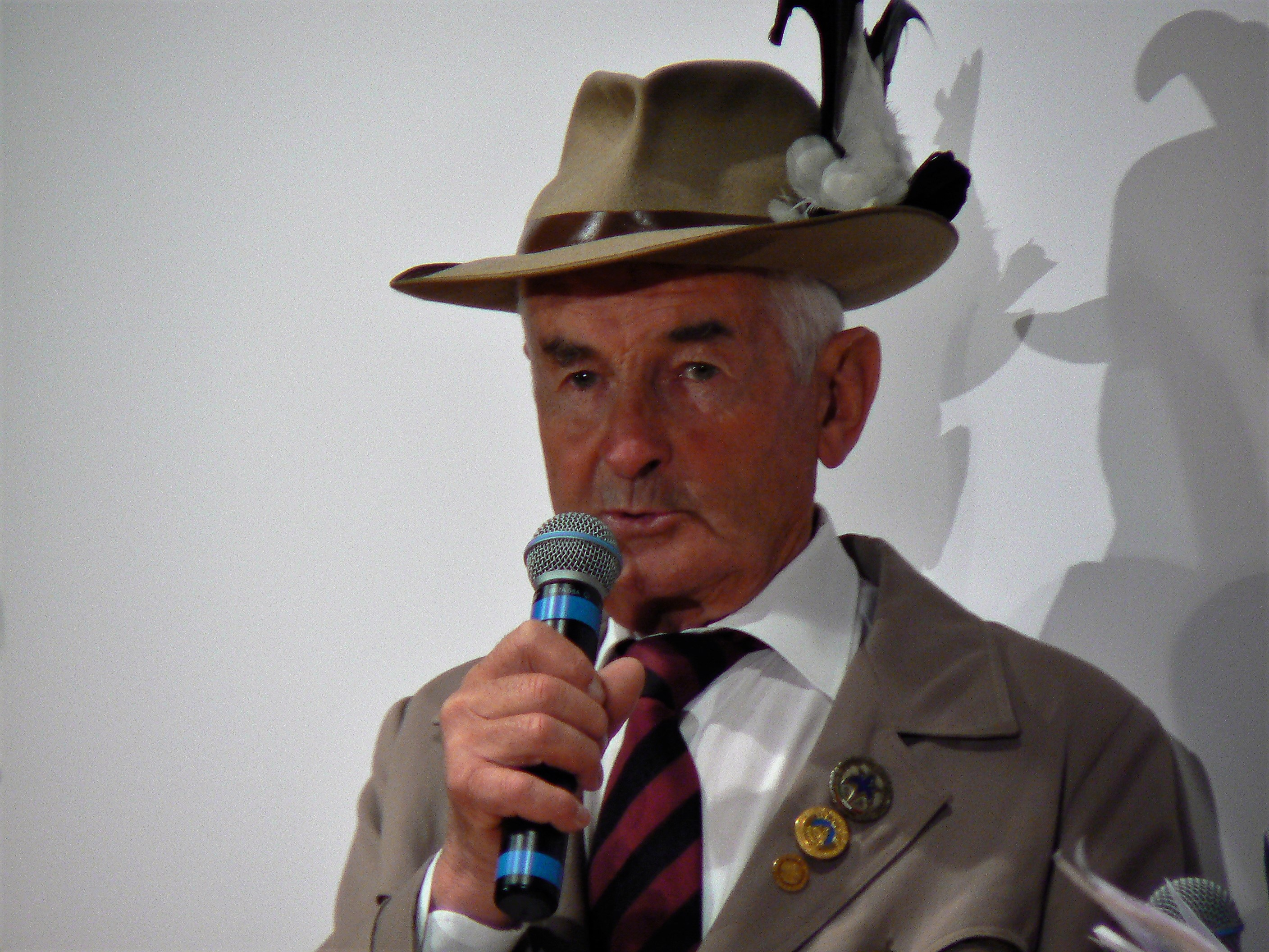 Cervino Cinemountain Festival, al microfono Antonio Carrel guida emerita delle Guide del Cervino.